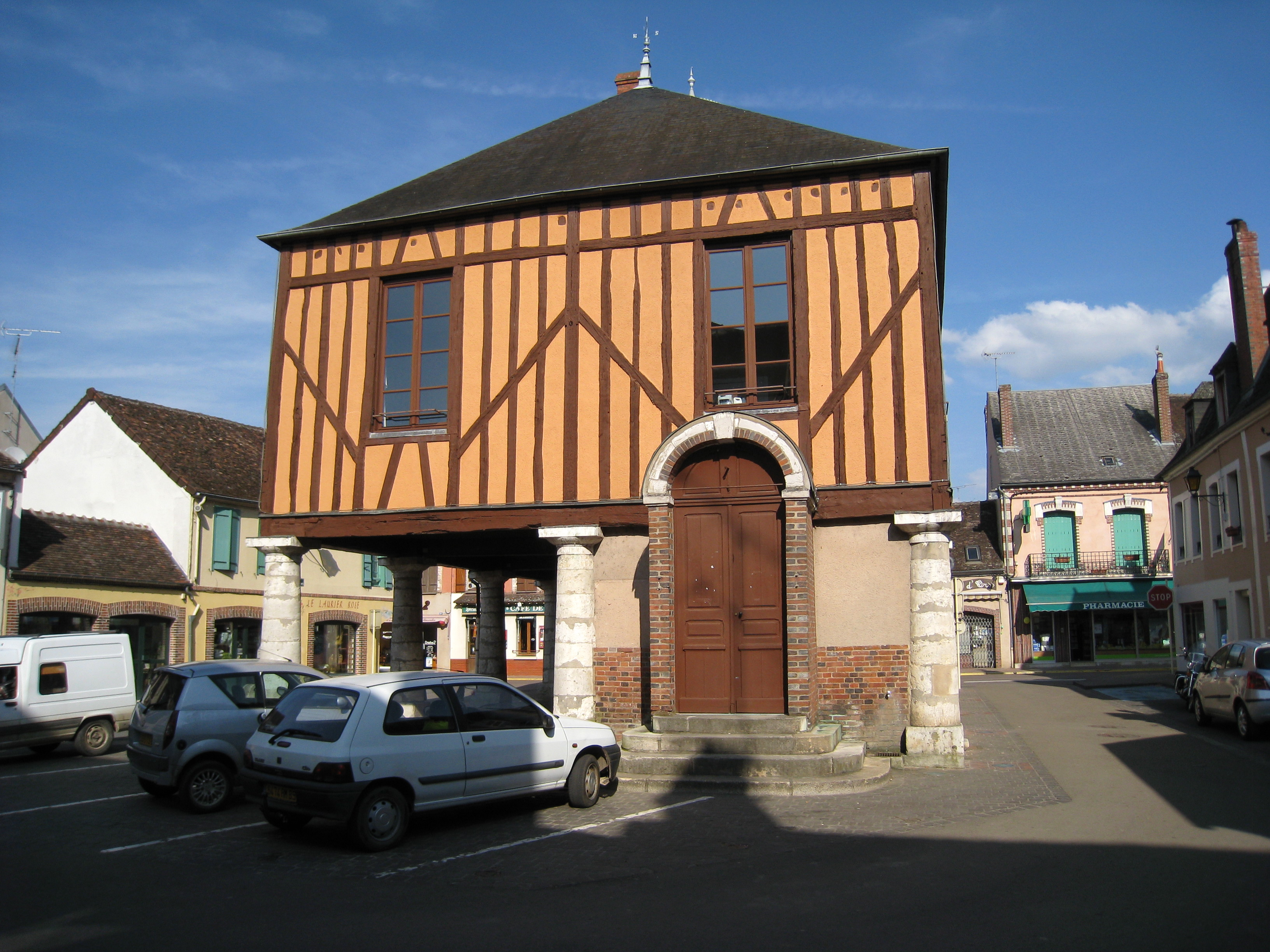 Halle Louis-Philippe de Charny, dans l'Yonne